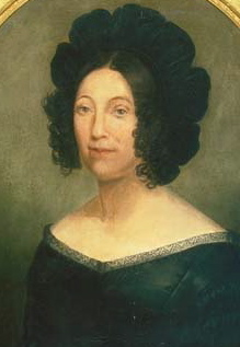 Michaela Almonaster y Roxas, baronne Delfau de Pontalba (1795-1874), Louisiana State Museum